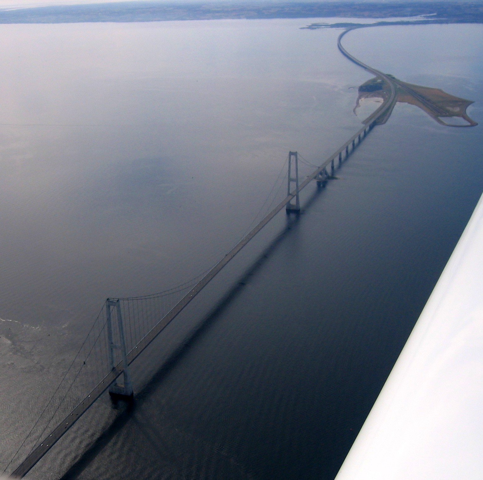 Storebæltsbroen, Denmark, seen from a glider. Taken by User:DrKjaergaard.